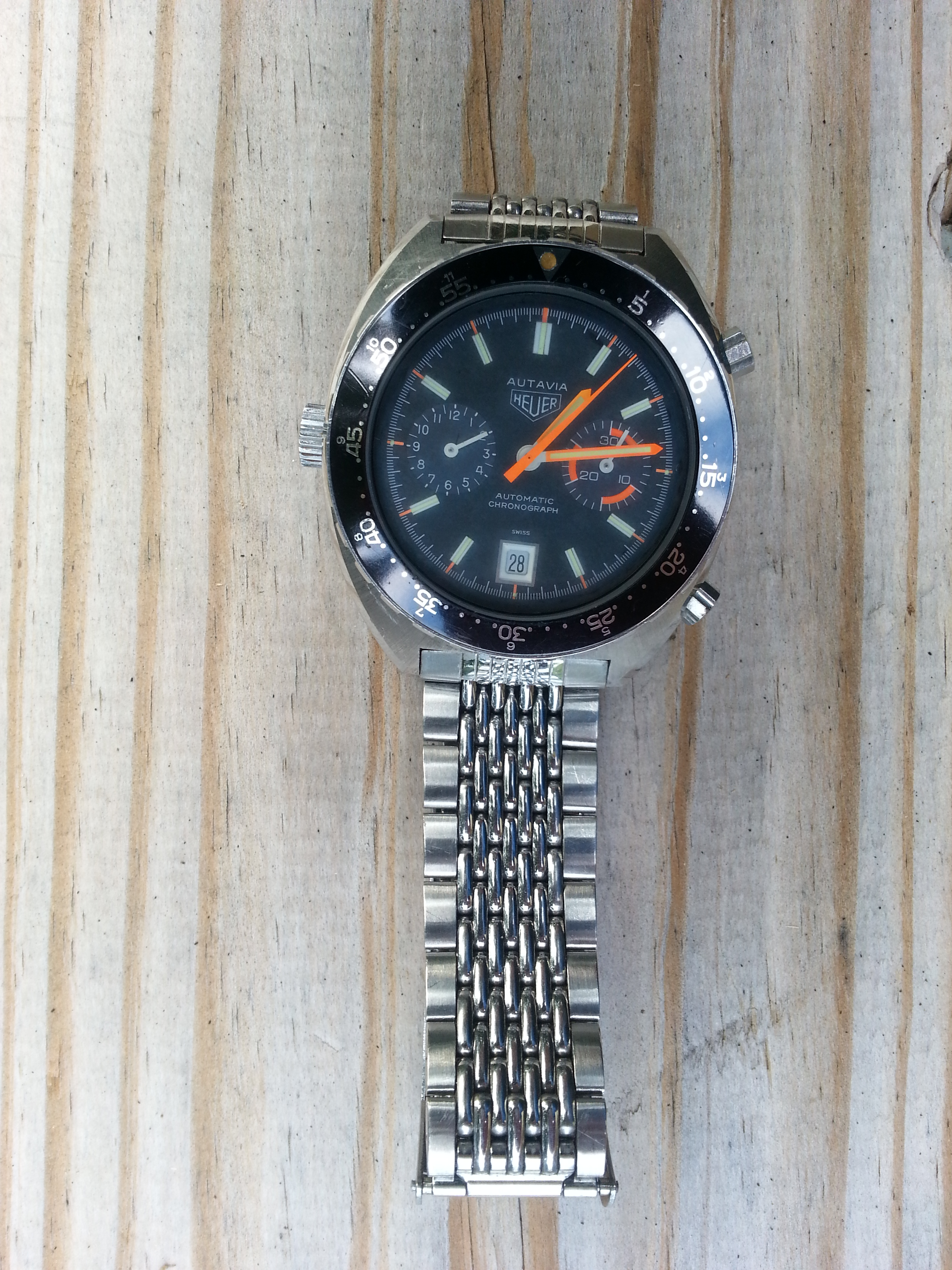 Heuer Autavia 11630 Orange